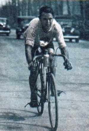 Sylvère Maes, 'Sprint 71', Panini figurina n°216.